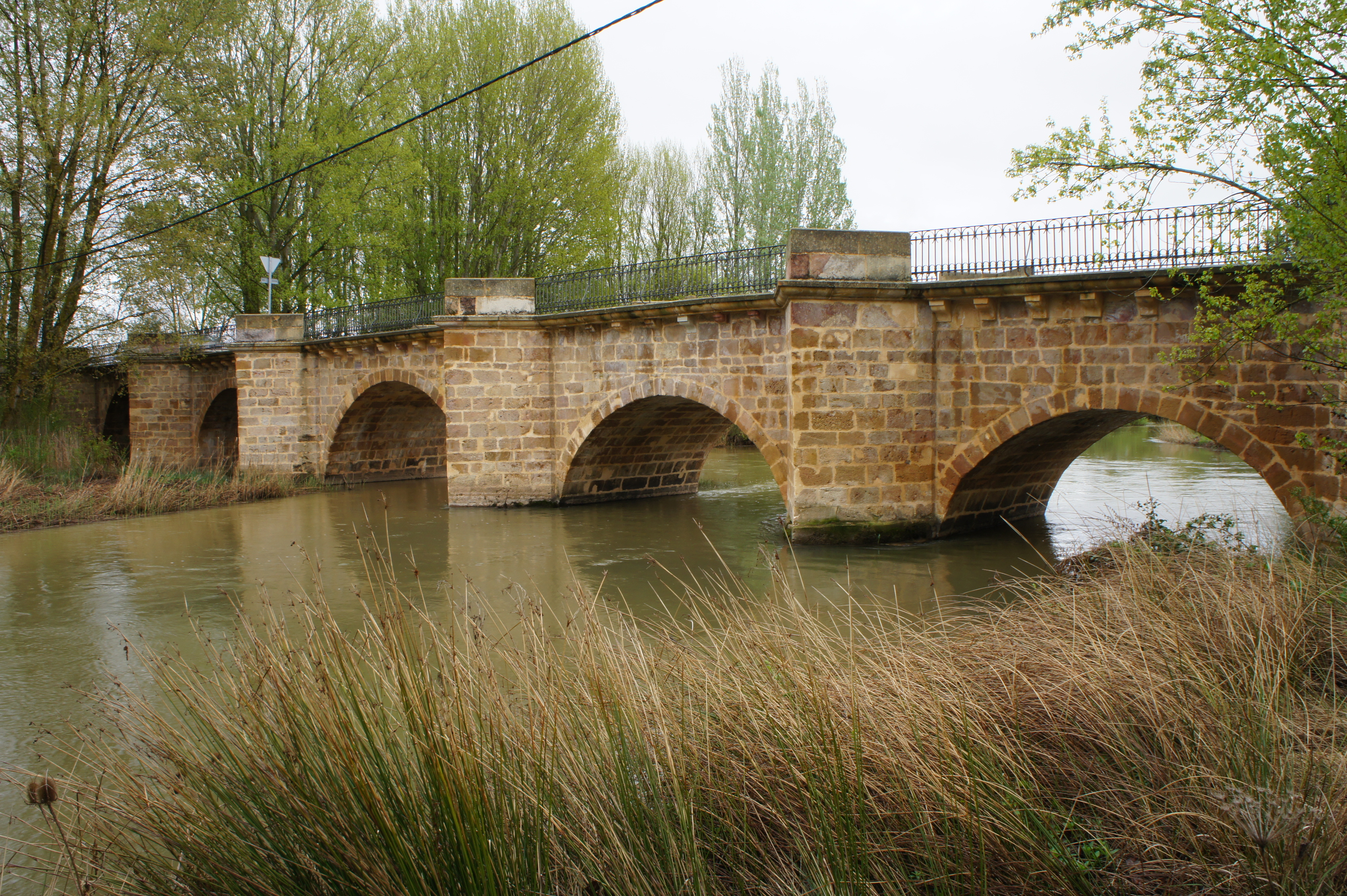 Vista parcial del puente desde ribera derecha, aguas arriba.